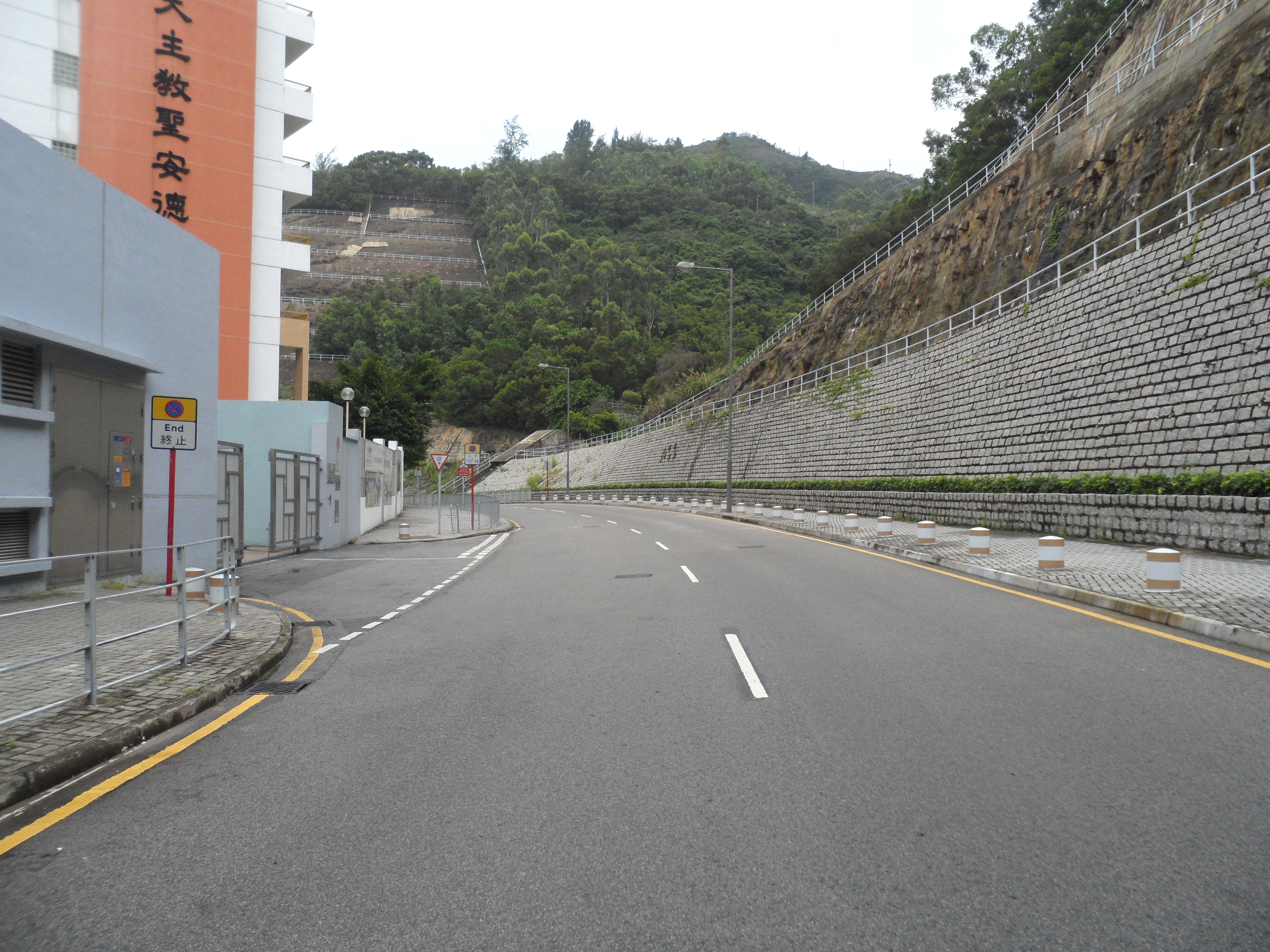 翠嶺路鄰近天主教聖安德肋小學